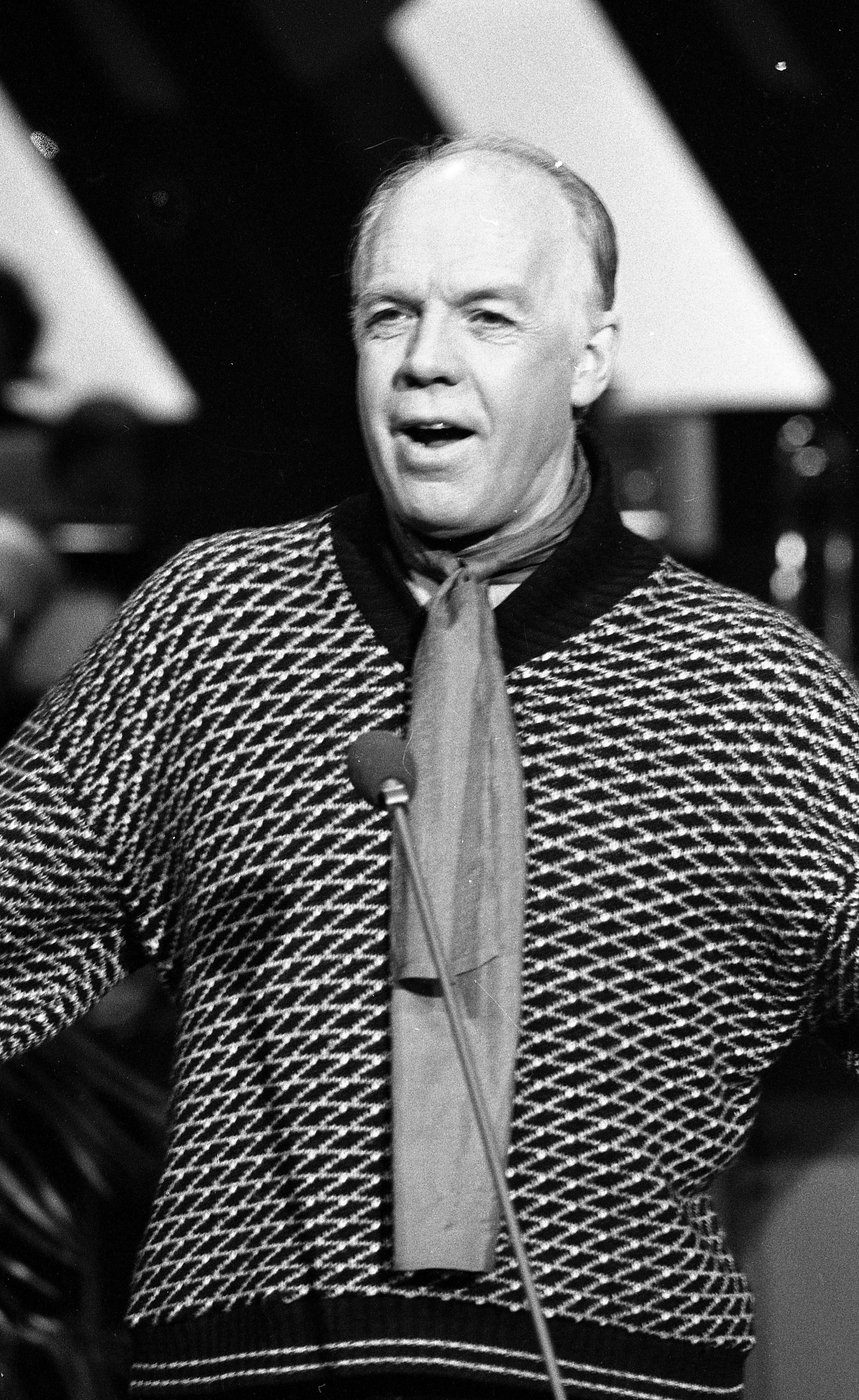 Spellemannsprisen 1980. Foto: Arne Nielsen. Arkivref.: PA-0797_U_9888_002_022